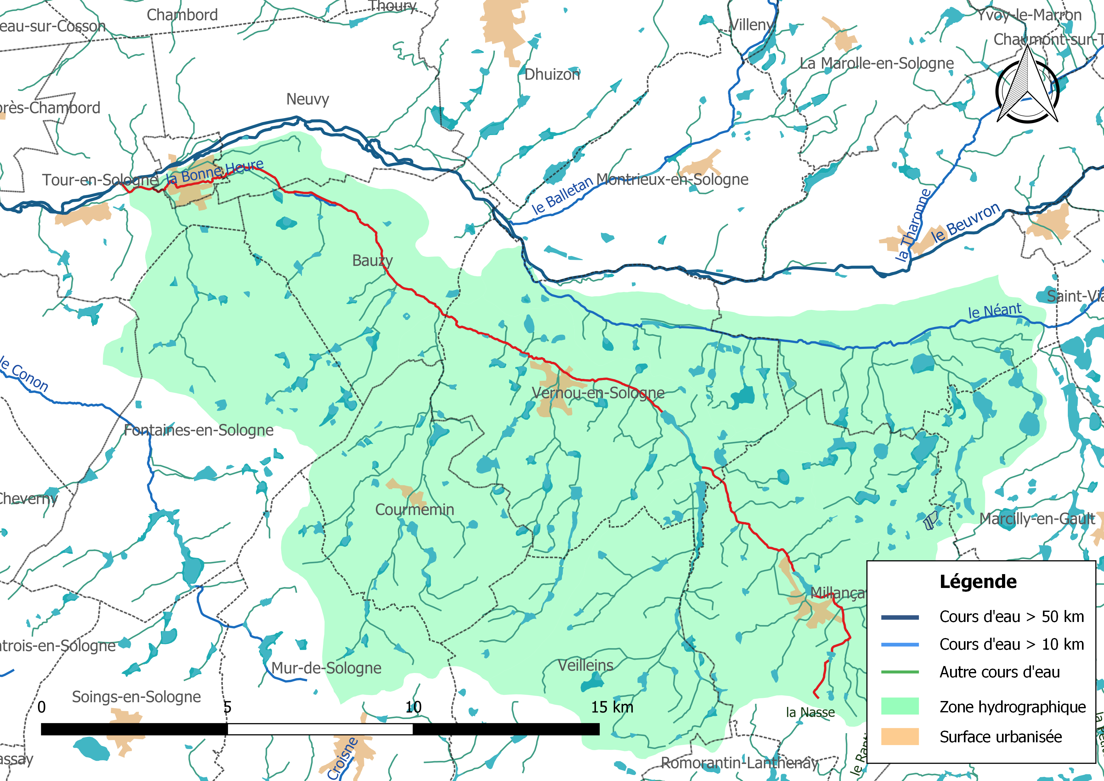 Carte du cours d'eau « la Bonne Heure » et de son bassin versant (zone hydrographique dans laquelle il s'insère).